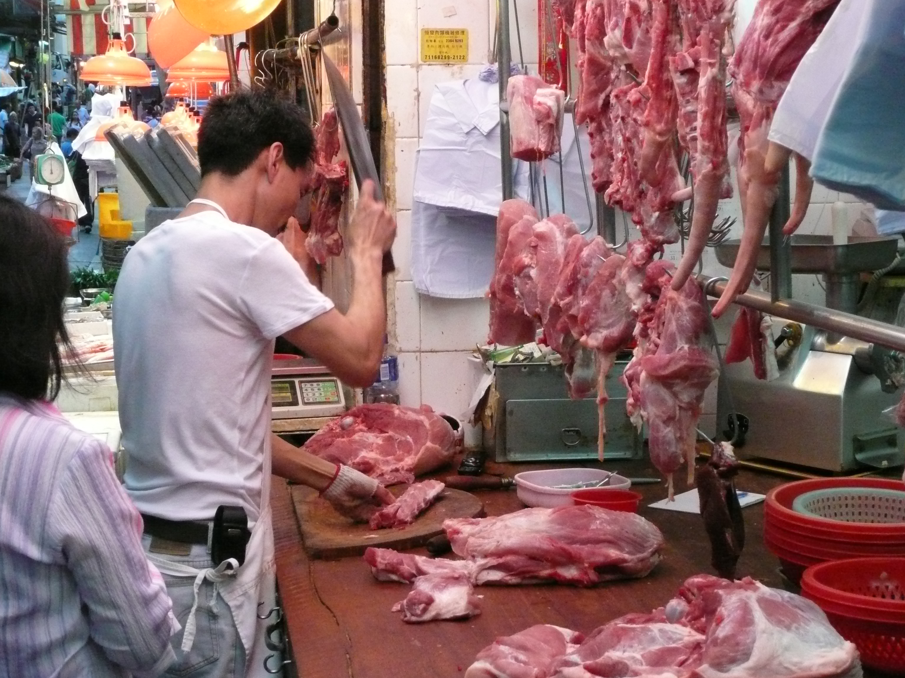 Hong Kong'lu bir kasap.